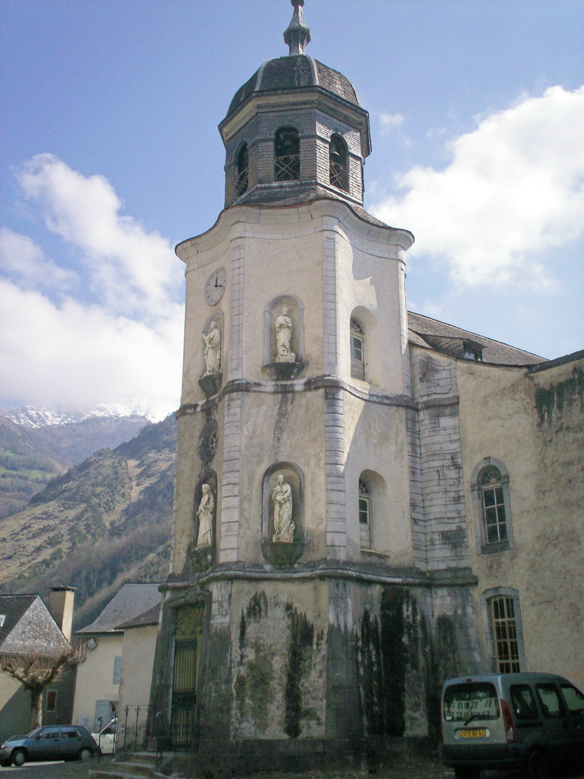 Campaner octogonau de la glèisa e Sarrança